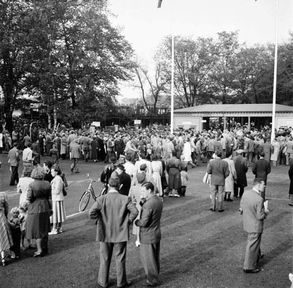 Råå - Helsingborgs IF allsvenskt toppderby 1950.